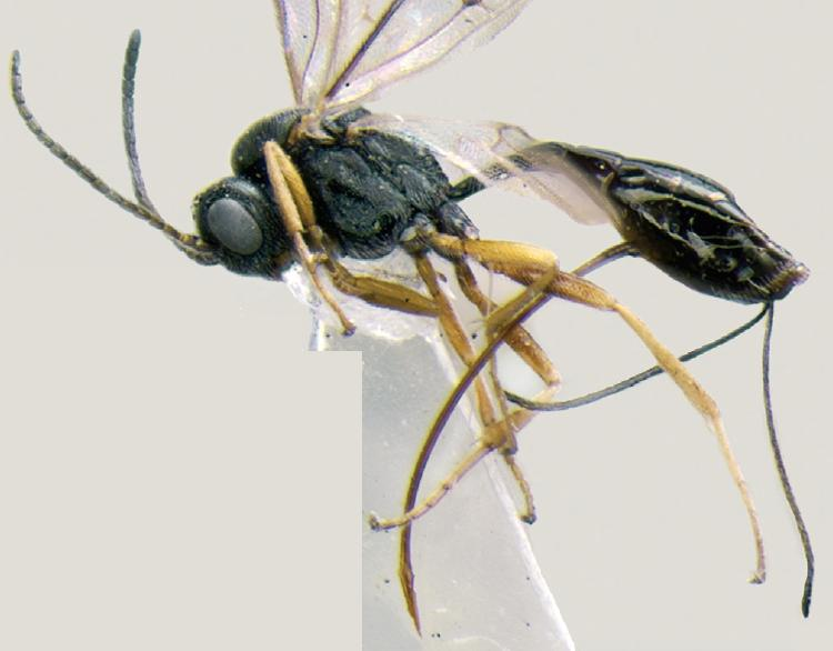 Tersilochus runatus (female)